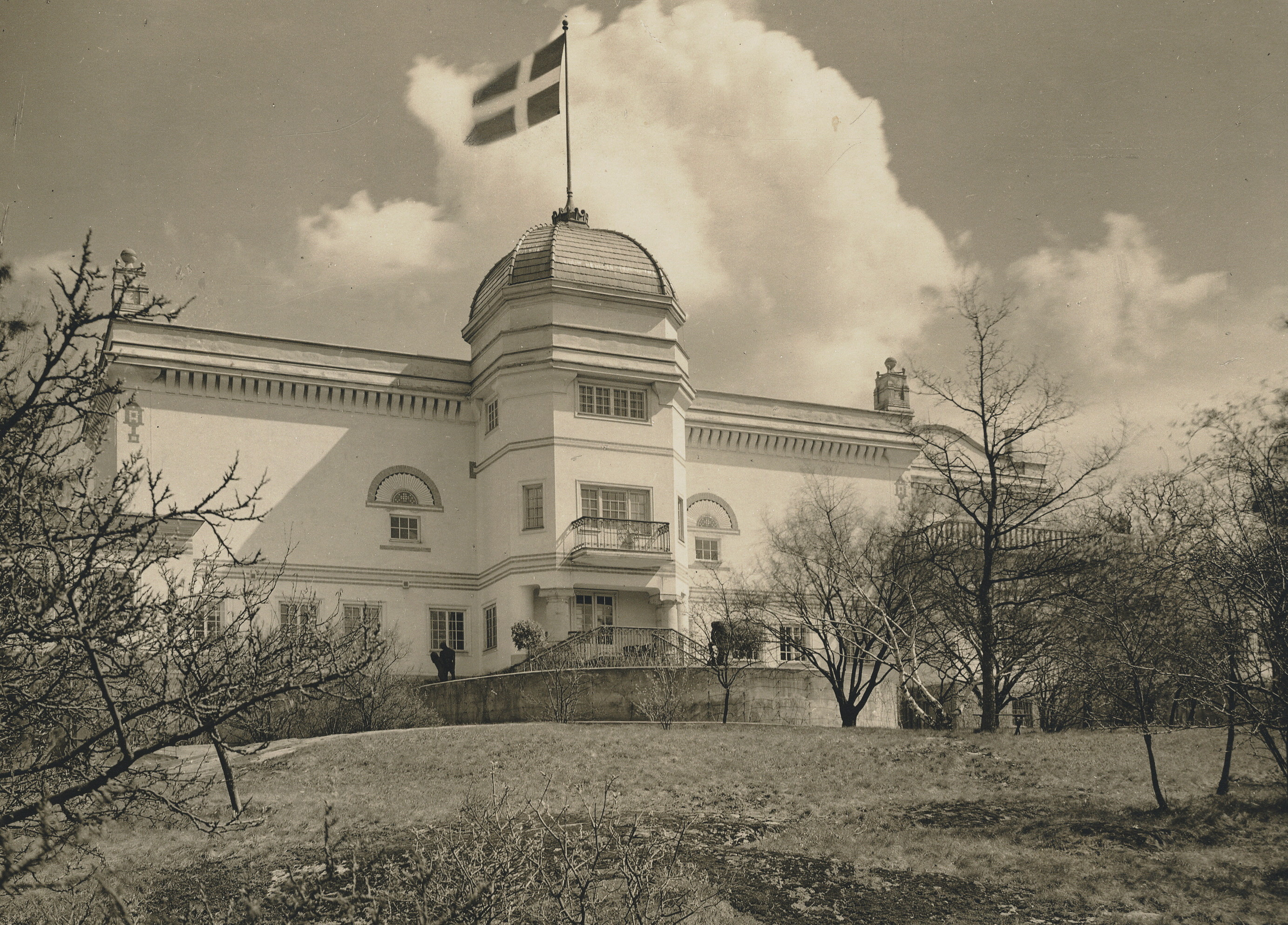 Thielska galleriet, fasad mot syd